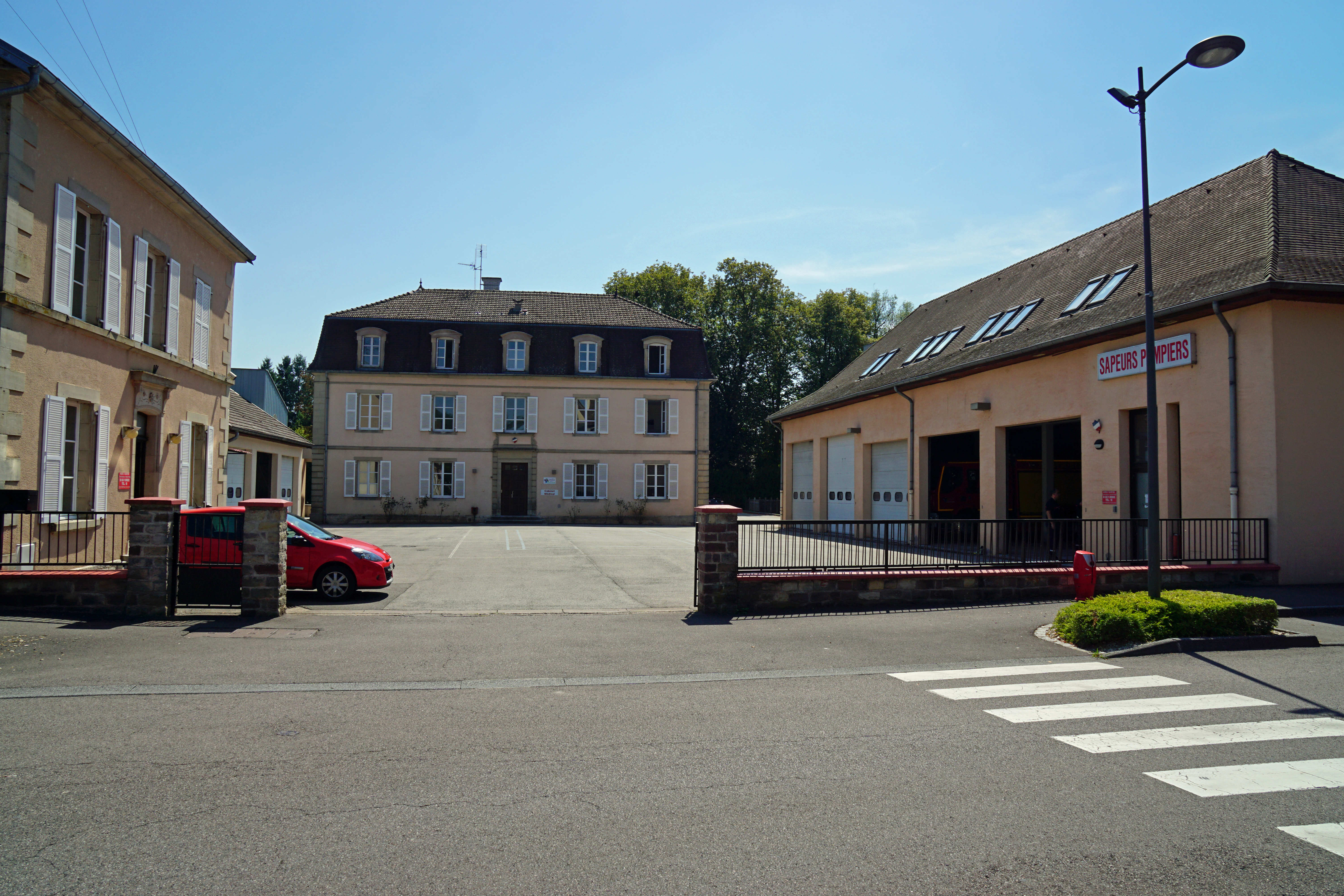 La caserne des pompiers de Lure.